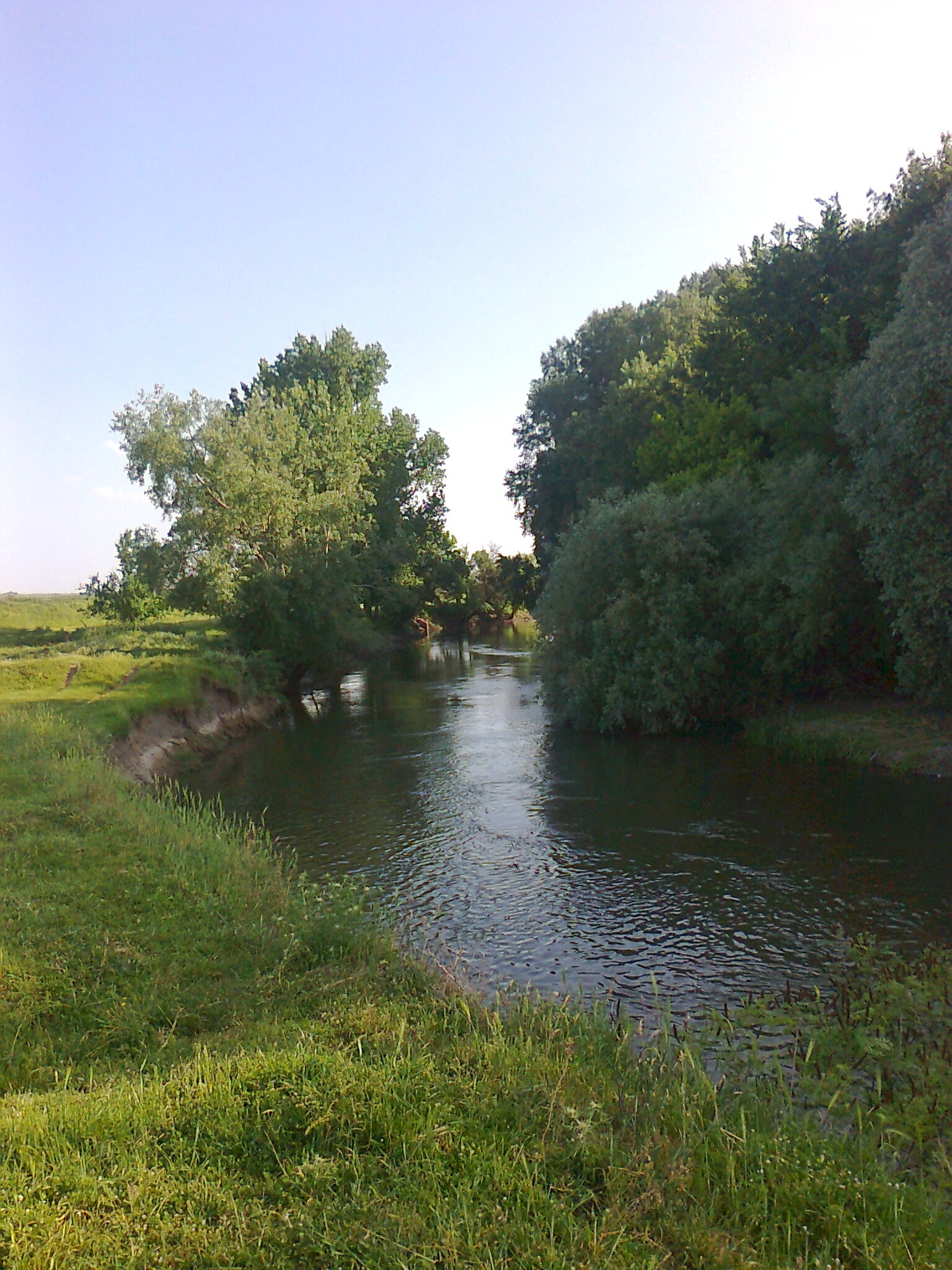 Река Тунджа.